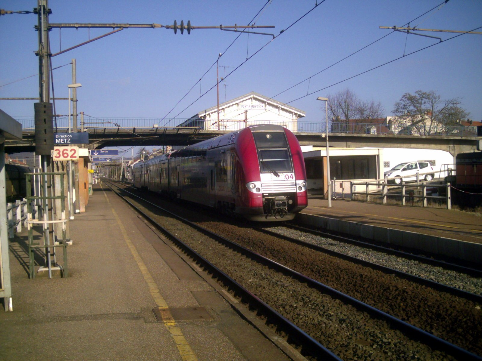 Gare de Pont-à-Mousson (54) : les quais avec la rame automotrice 2204 des CFL assurant un trajet Luxembourg-Nancy